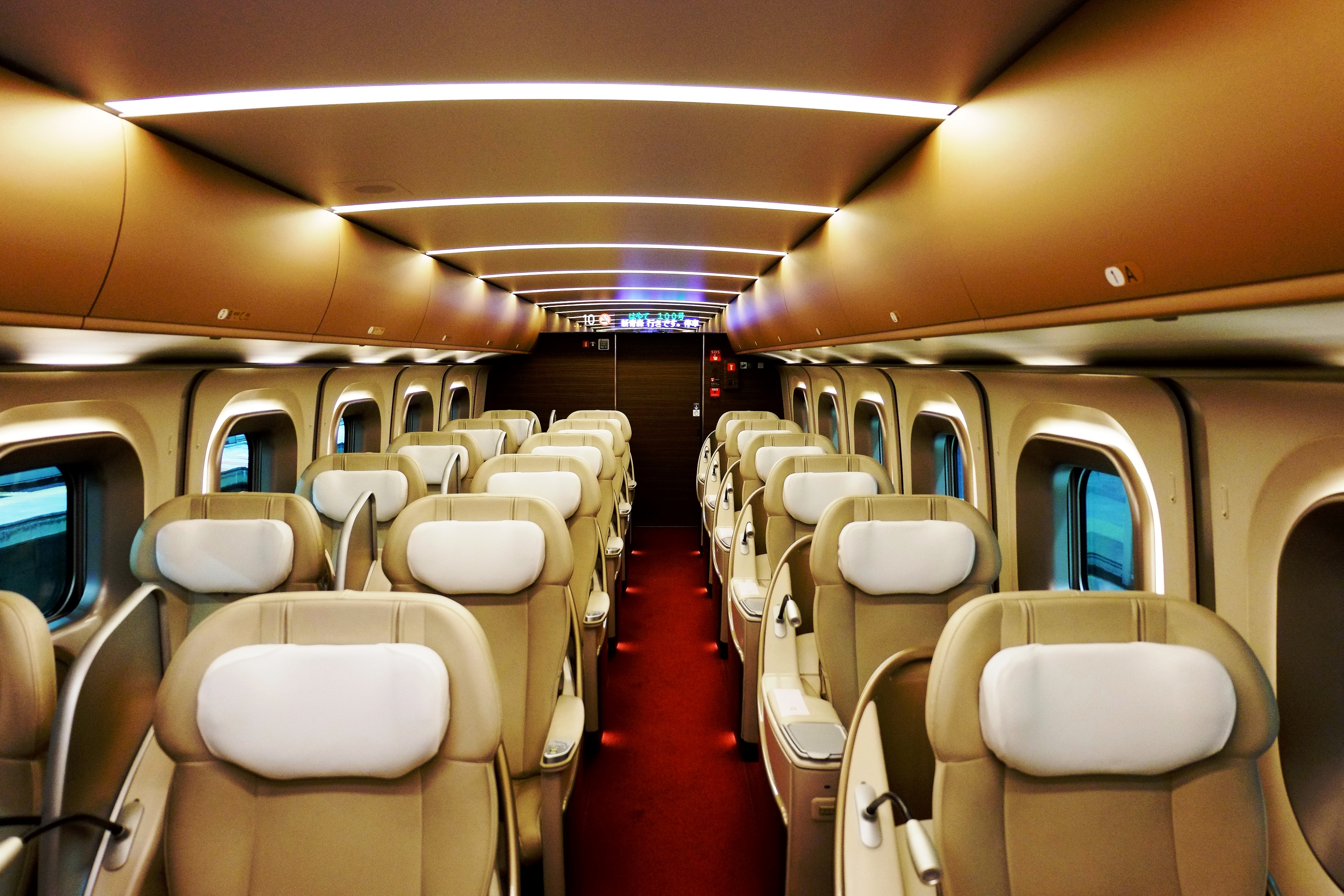 E5系グランクラス車内（はやて100号）